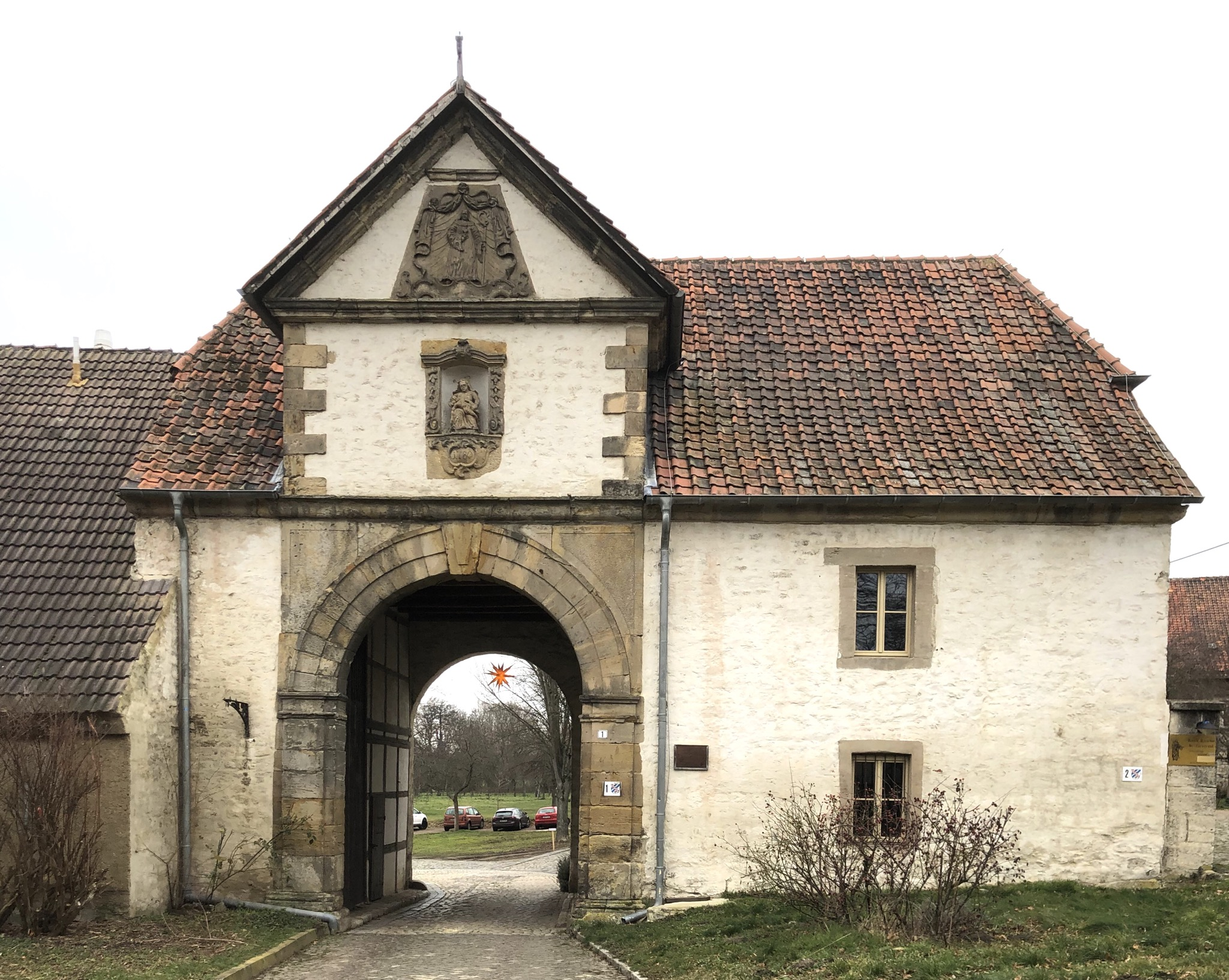 Kloster Hedersleben